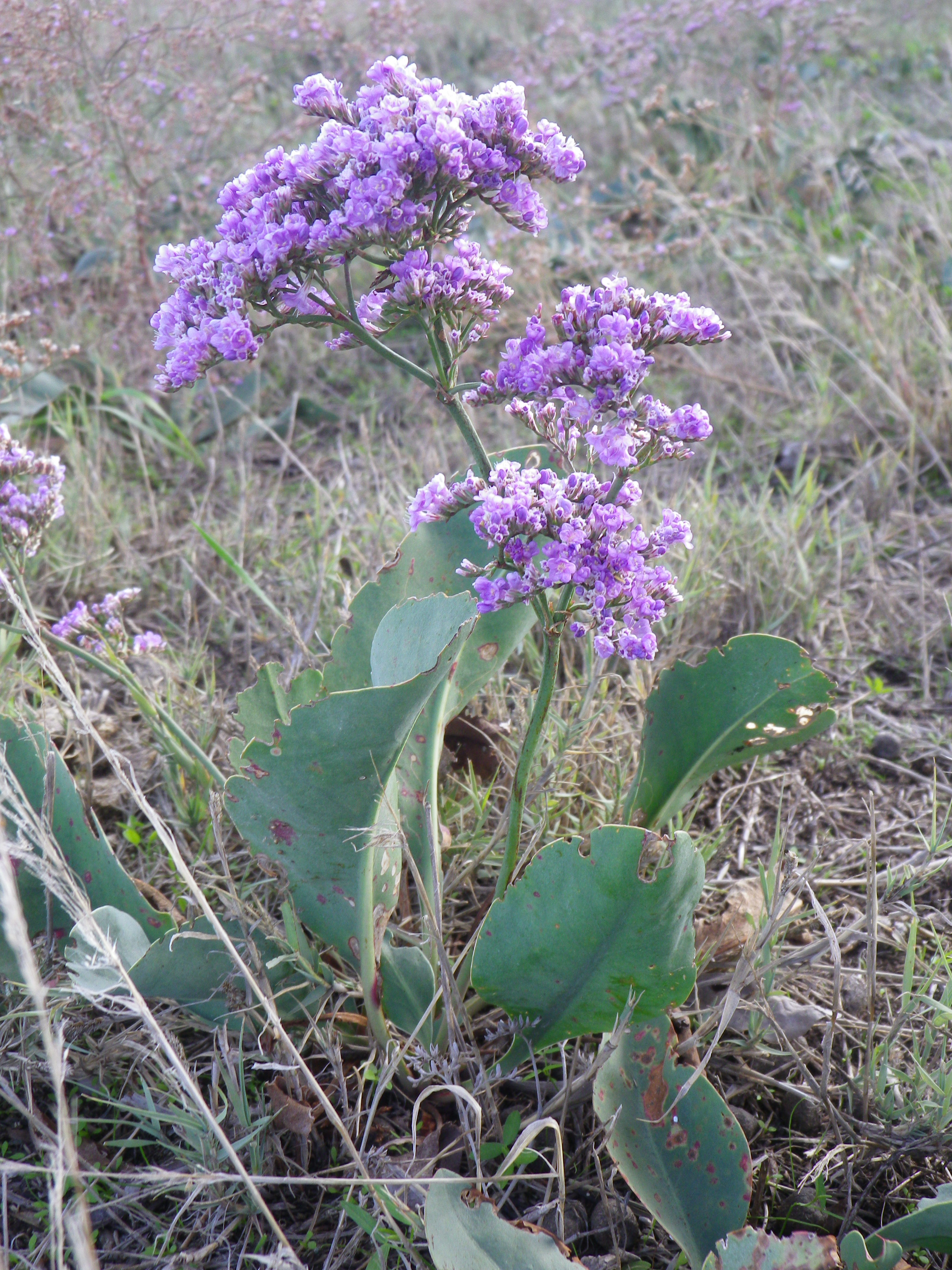 L. gmelinii (Willd.) O. Kuntze ( К. Гмеліна)